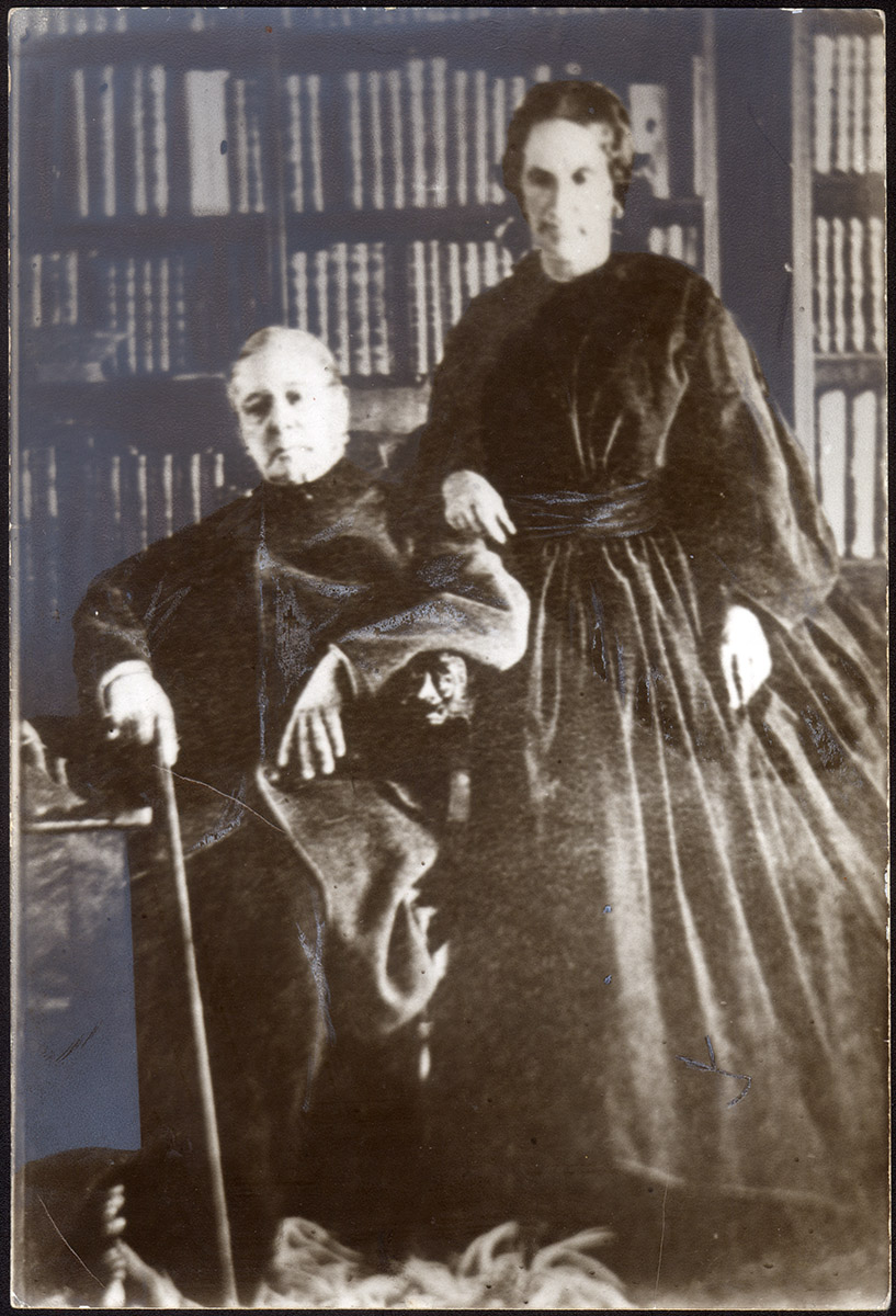 Daguerrotipo de Andrés Bello y su esposa Isabel Dunn en Santiago de Chile hacia 1862